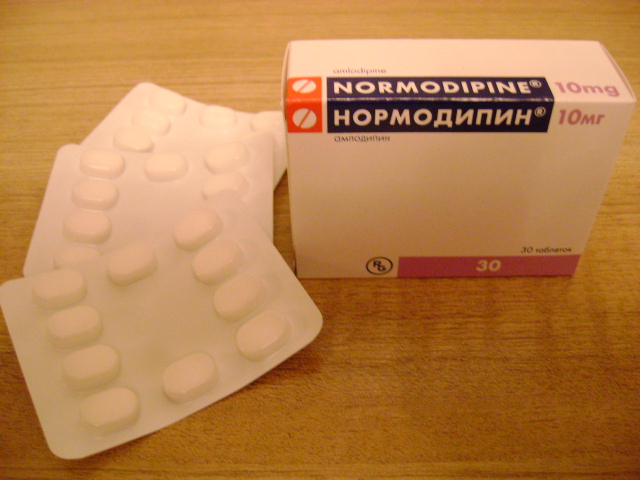 упаковка таблеток Нормодипина